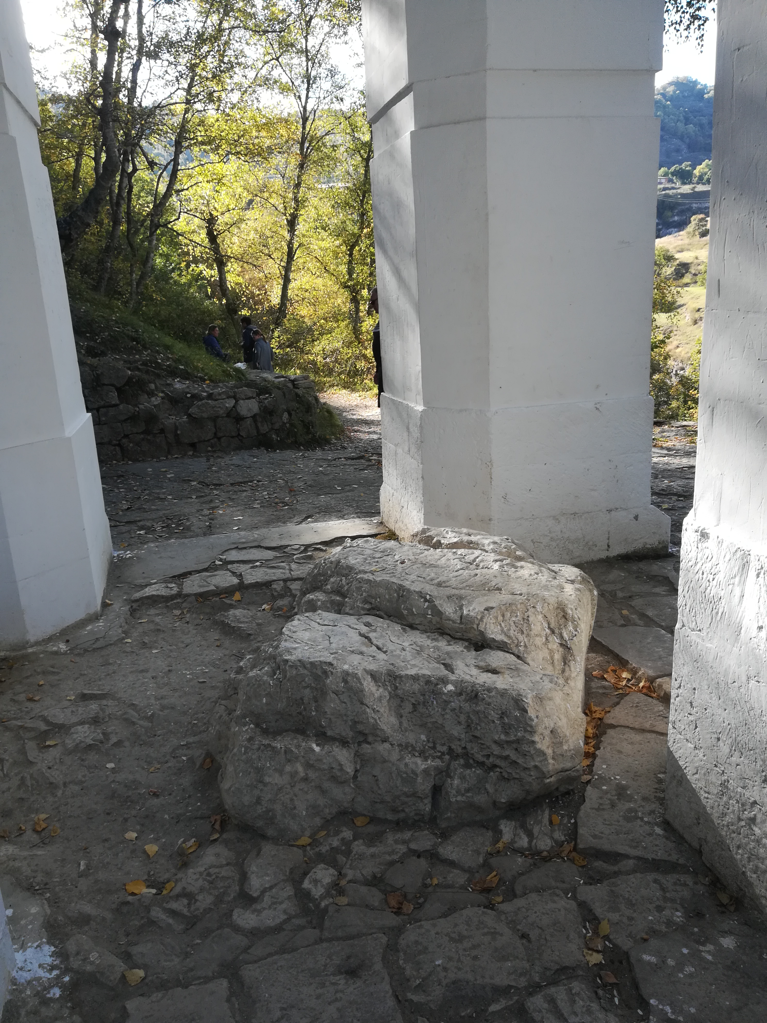 Дагестан